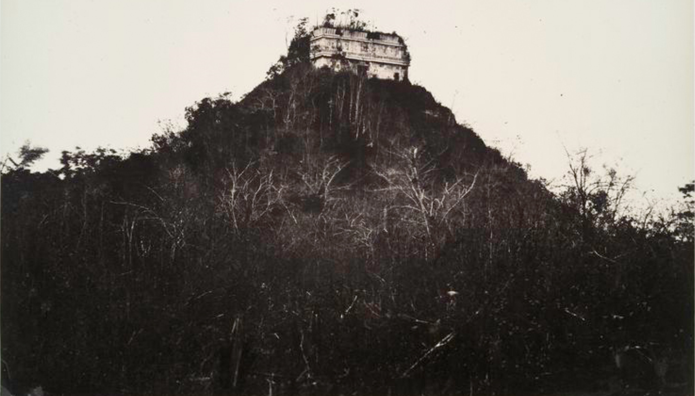 Templo de Kukulkán, como lo encontró Désiré Charmay en 1860.